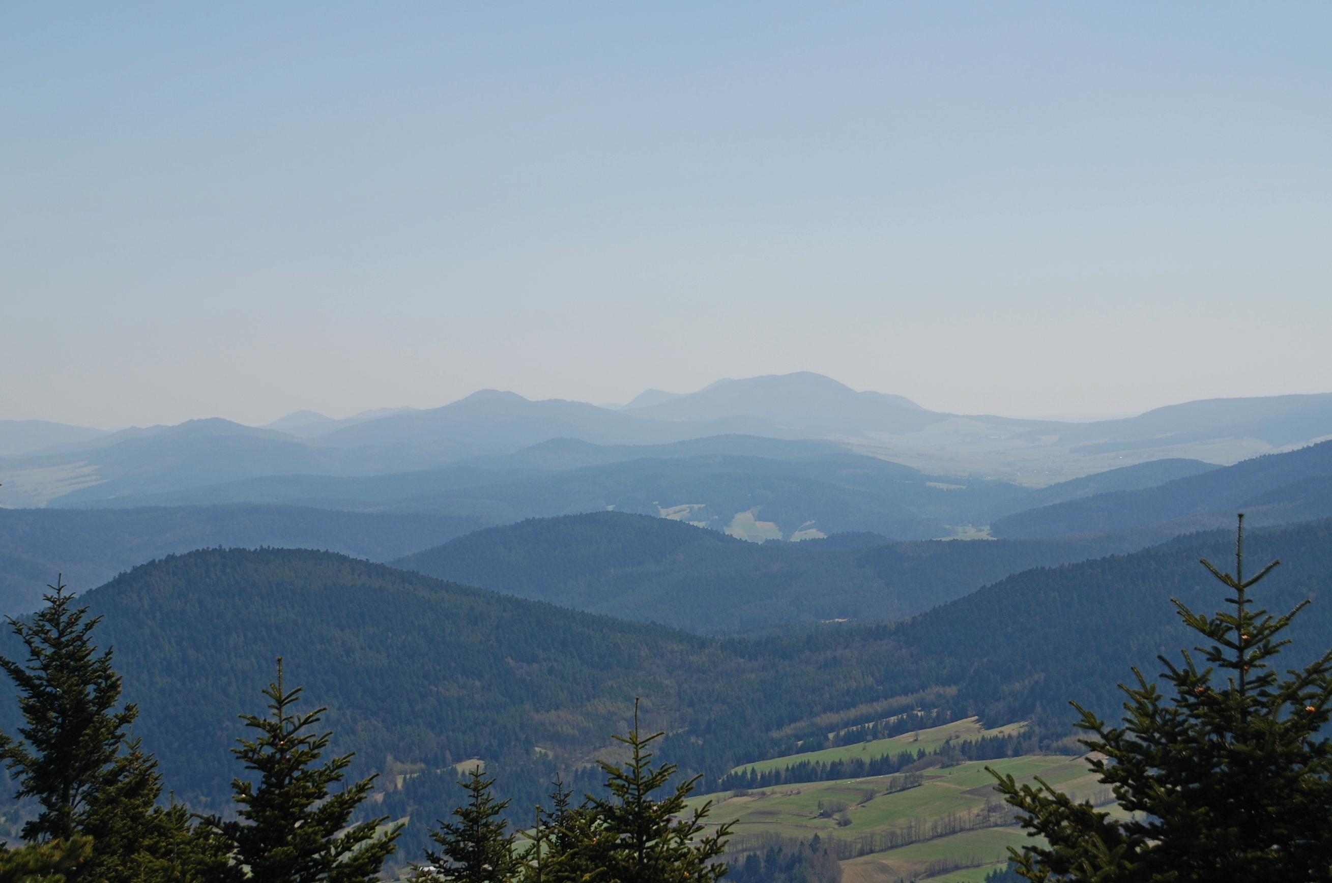 wsie Bogusza i Ptaszkowa